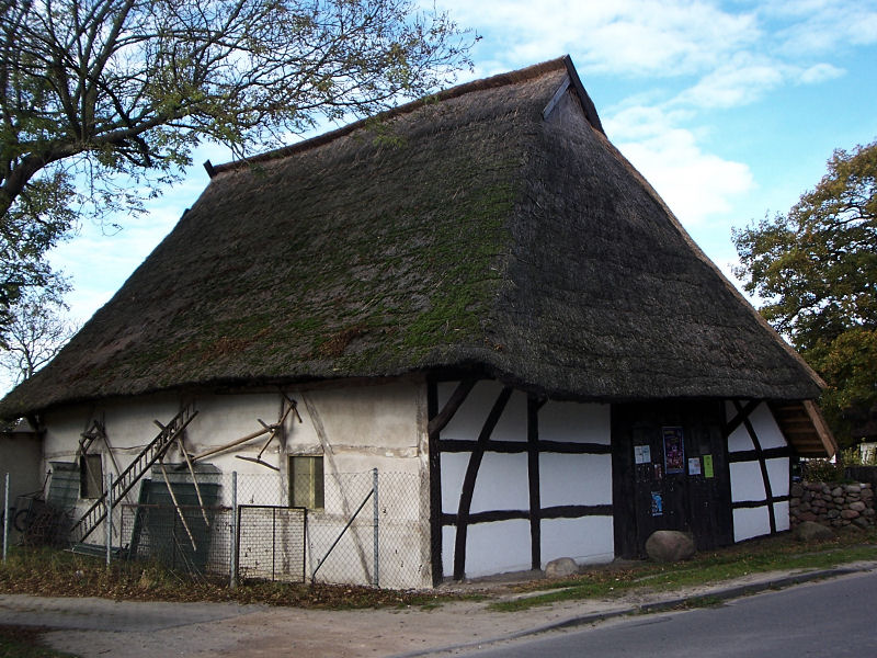 historische Scheune in Börgerende